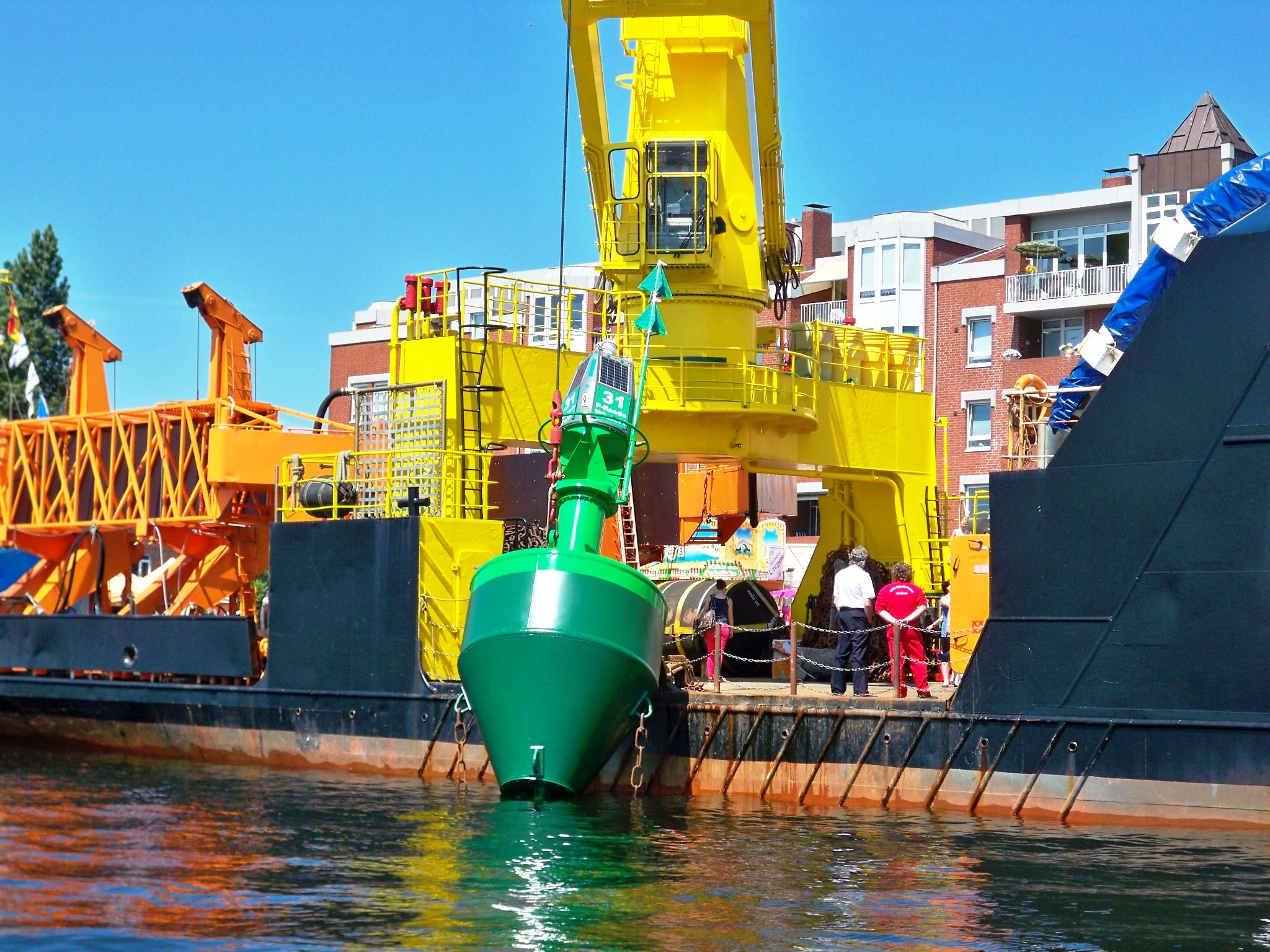 Gewässerschutzschiff Mellum beim Open Ship während des Wochenendes an der Jade